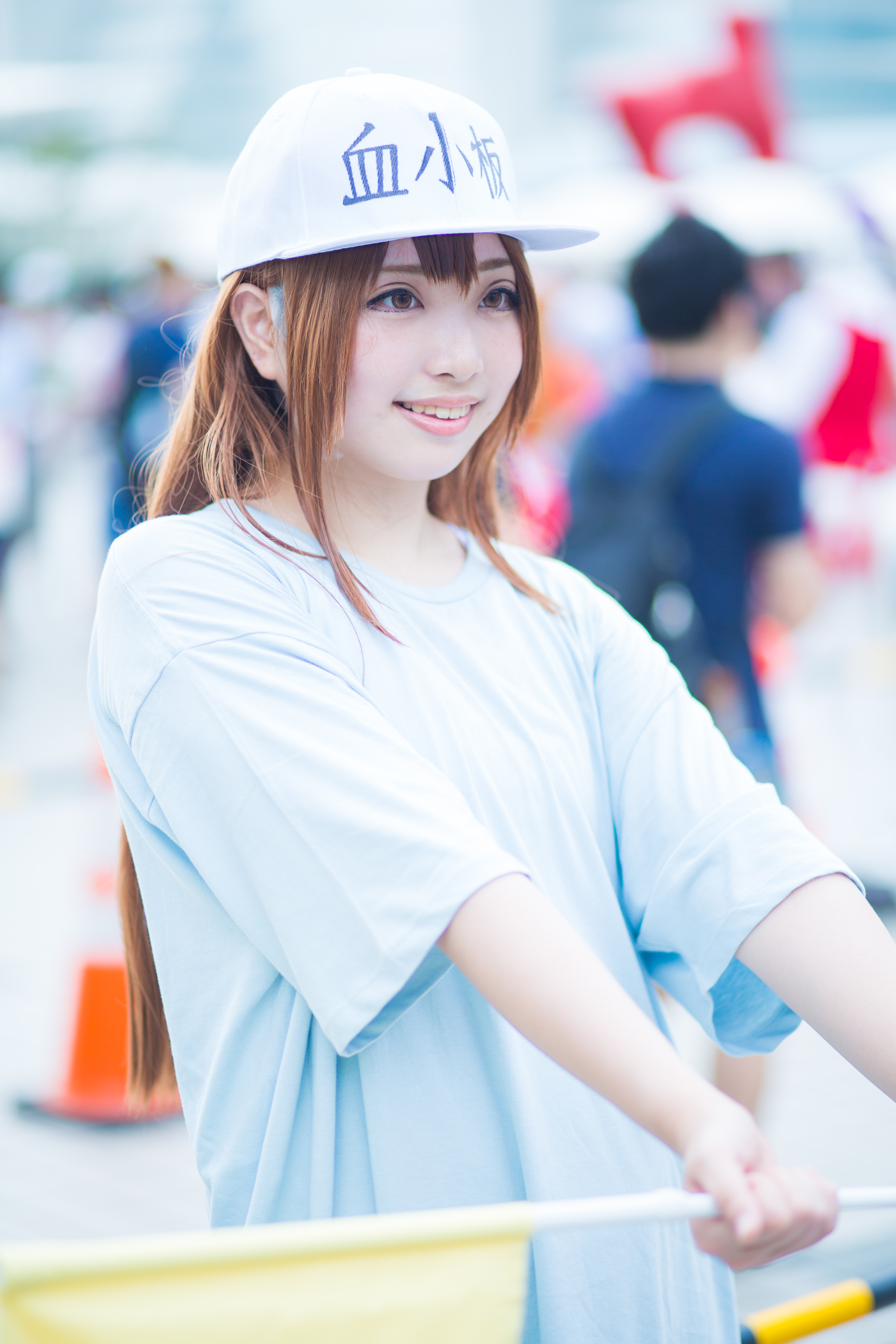 コミックマーケット94 2日目 コスプレイヤー